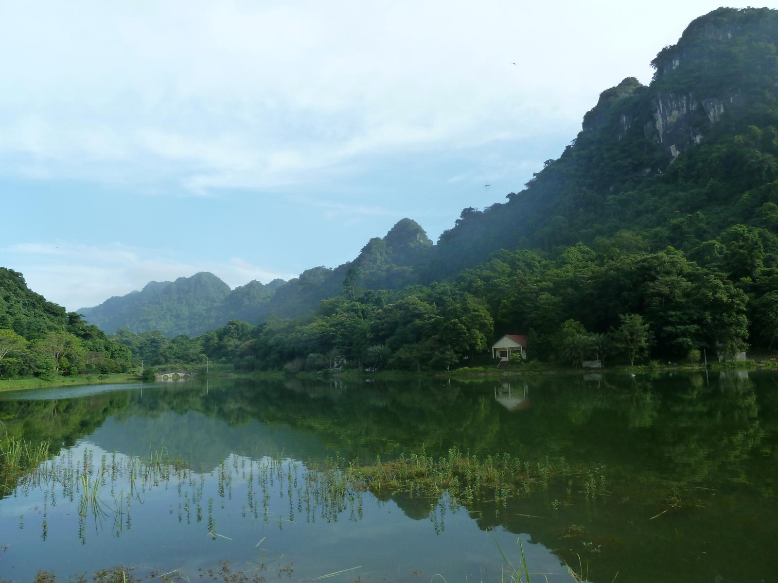 Blog del viaje: Pululando por Vietnam